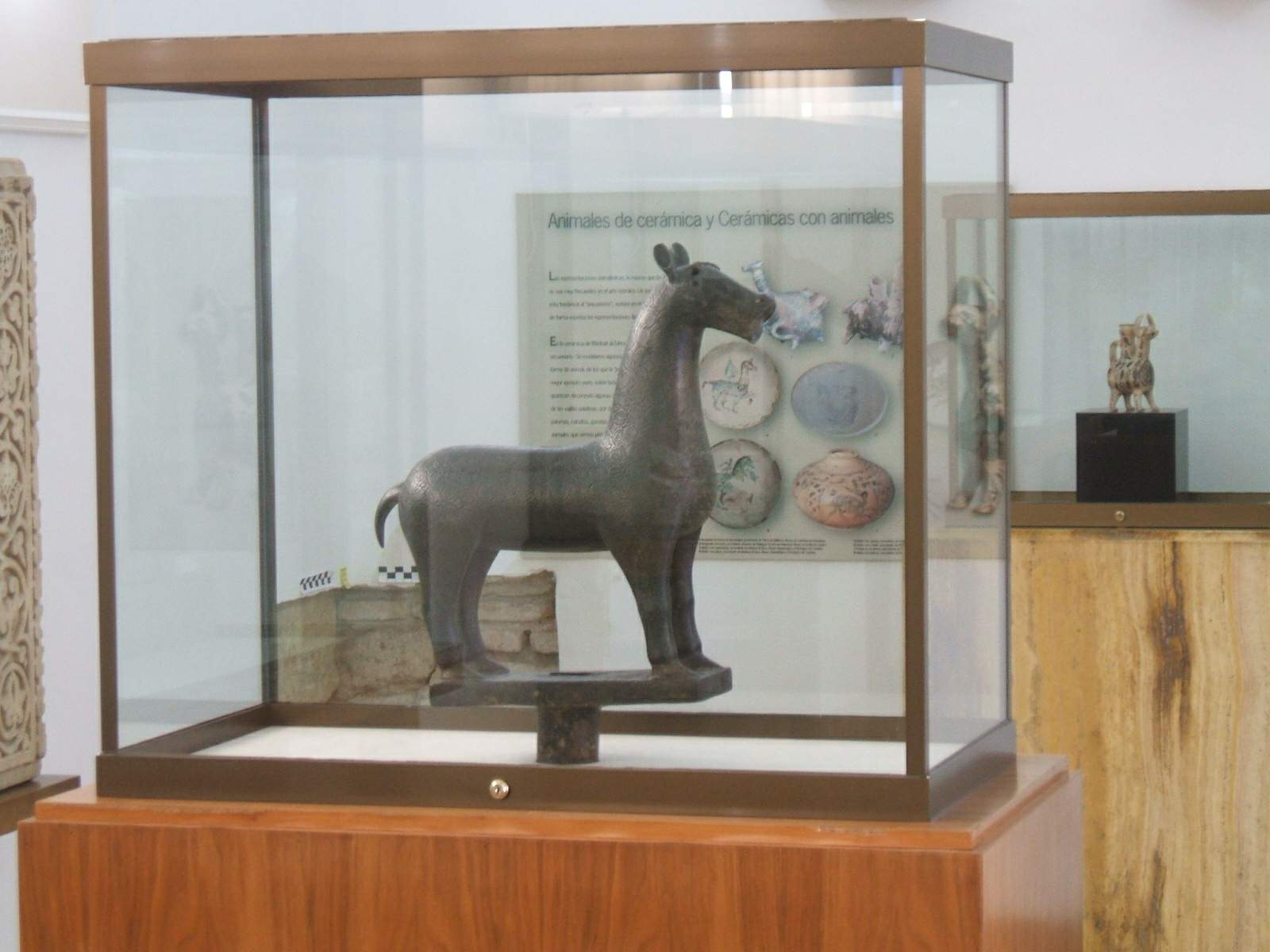 Cervatillo de Madinat al-Zahra. Bronce. Época califal, segunda mitad del siglo X. Procedencia: de Madinat al-Zahra, de donde pasó al Monasterio de San Jerónimo de Valparaíso. Museo Arqueológico y Etnológico de Córdoba, España